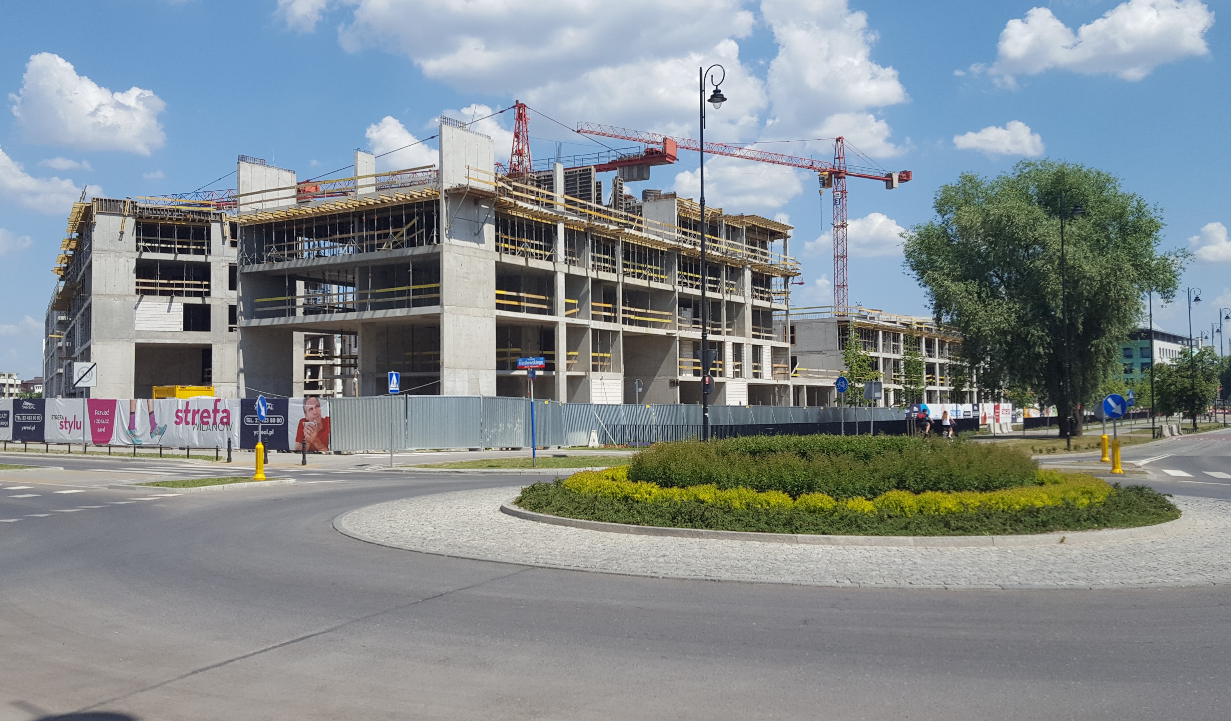 Yareal, construction site